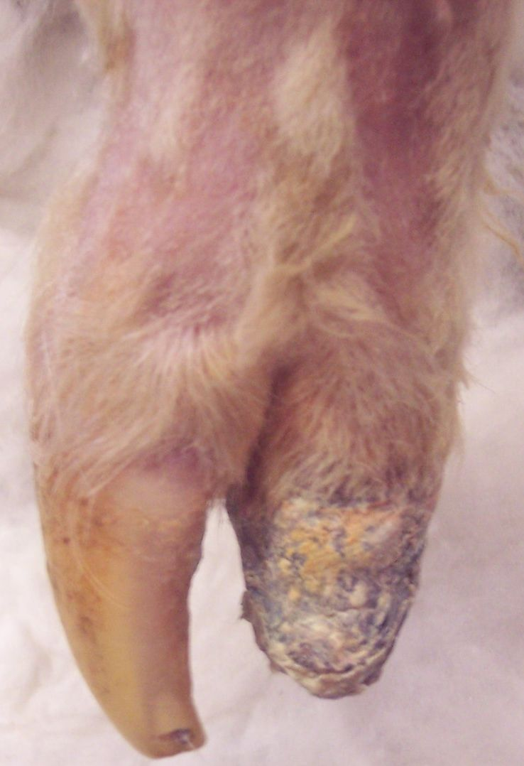 Ausschuhen nach Klauenrehe bei einem Schafloss of the claw in a sheep due to Laminitis